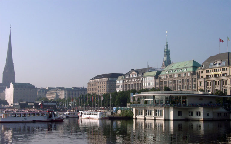 Schiffanlegestelle und Alsterpavillon an der Binnenalster in Hamburg.